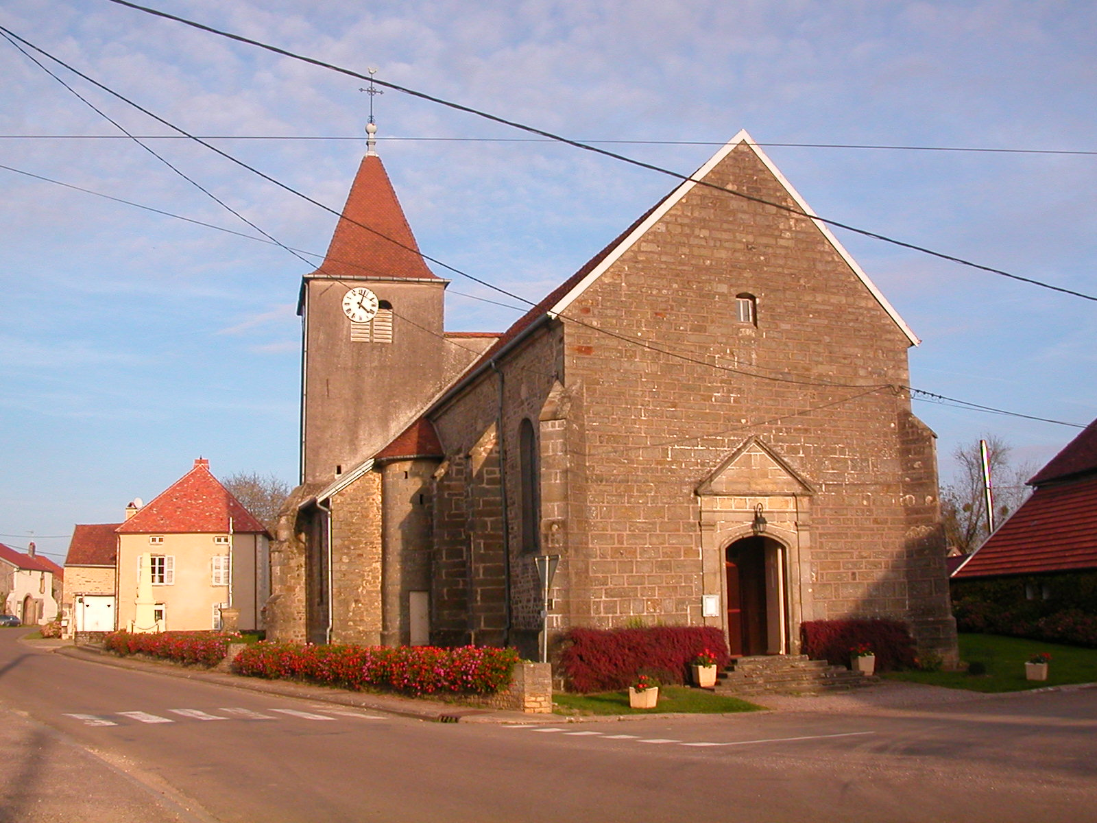 Église d'Ouge, en Haute-Saône